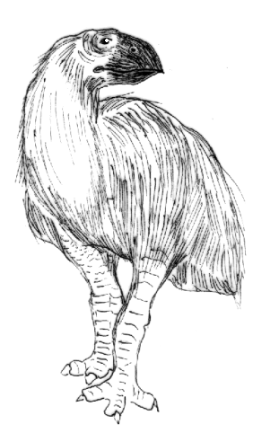 Diatryma